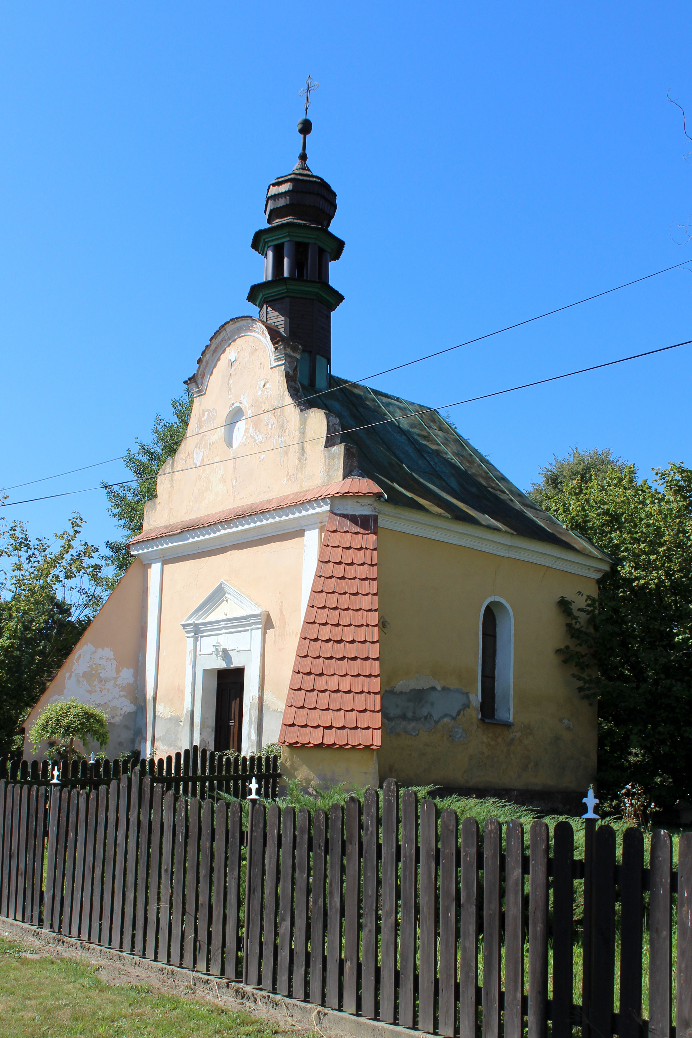 Przechód - wieś w Polsce w województwie opolskim, w powiecie nyskim w gminie Korfantów.